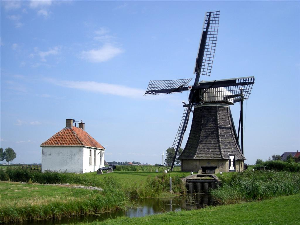 Babuurstermolen